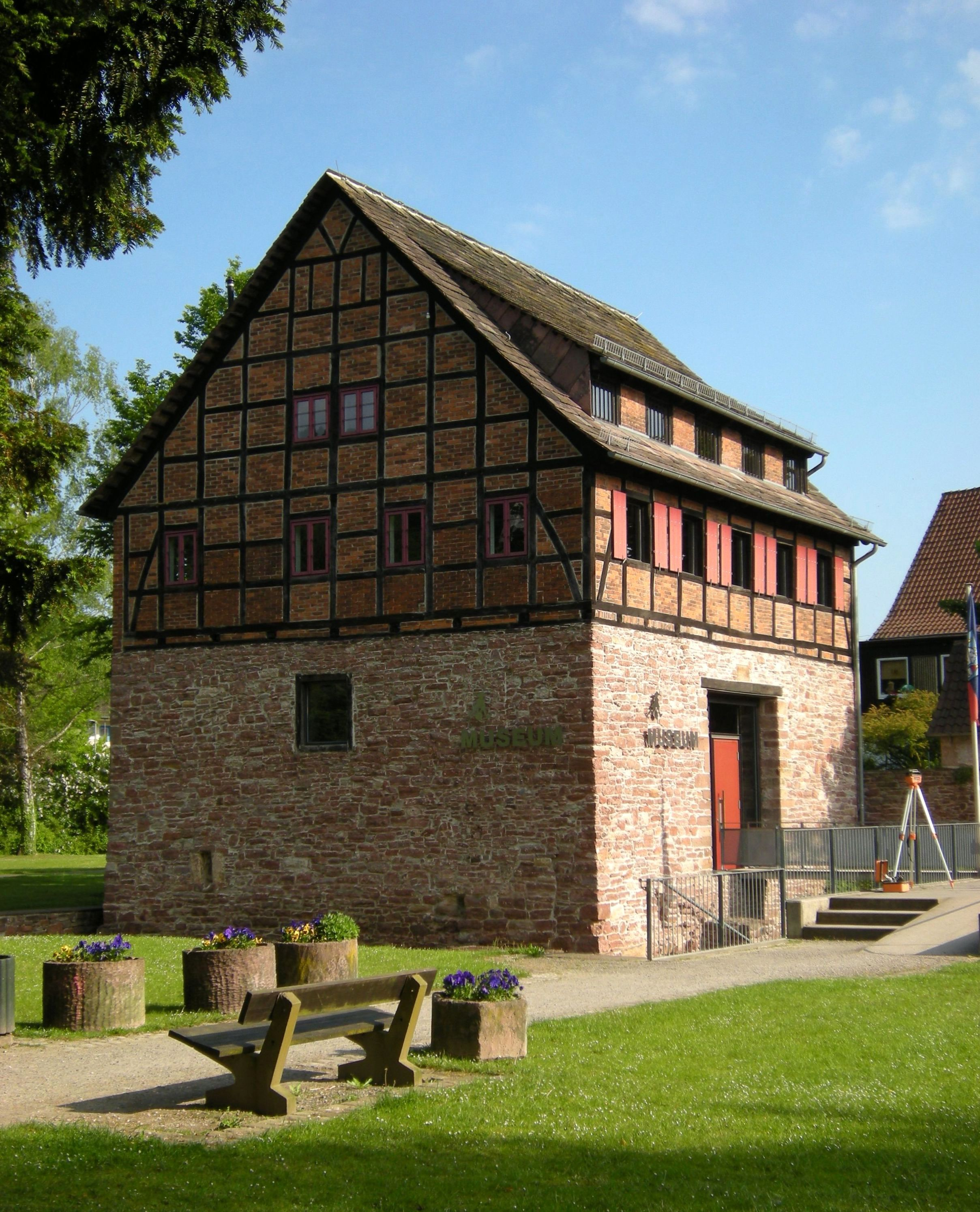 Bodenwerder-Münchhausen-Museum.jpg